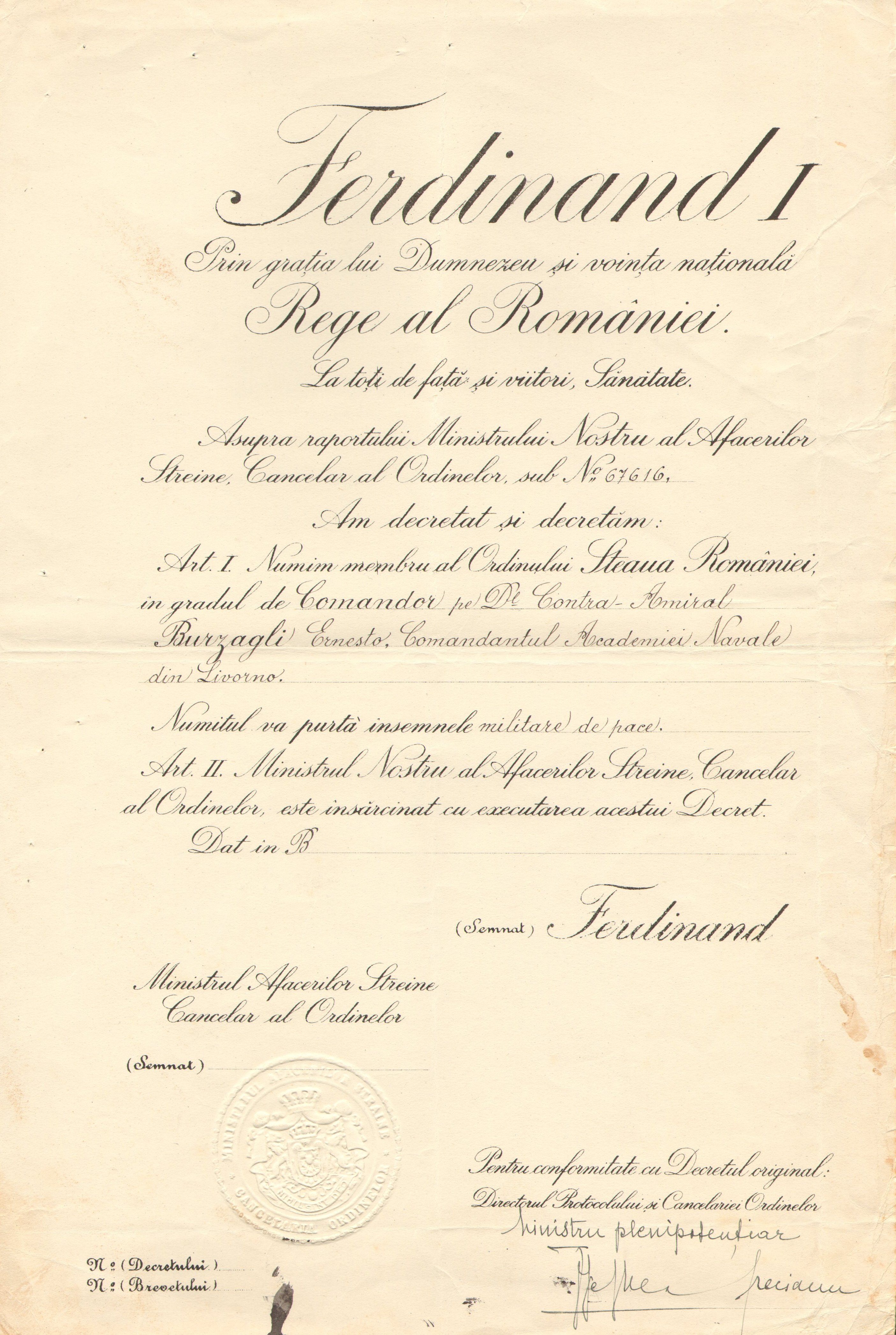 Award "Ordinului Steaua Romaniei"